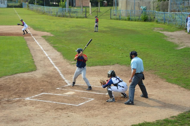 Председатель областной государственной администрации Сергей Кузьменко посетил стадион "Диамант", где в рамках чемпионата Украины по бейсболу, состоялся матч между двумя местными командами КНТУ "Елисаветград" и СДЮШОР "Диамант".